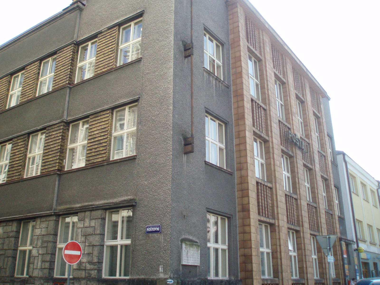 Náchod, nároží Masarykova náměstí a Poštovní ulice. Cihlová architektura pošty z roku 1930 od Milana Babušky